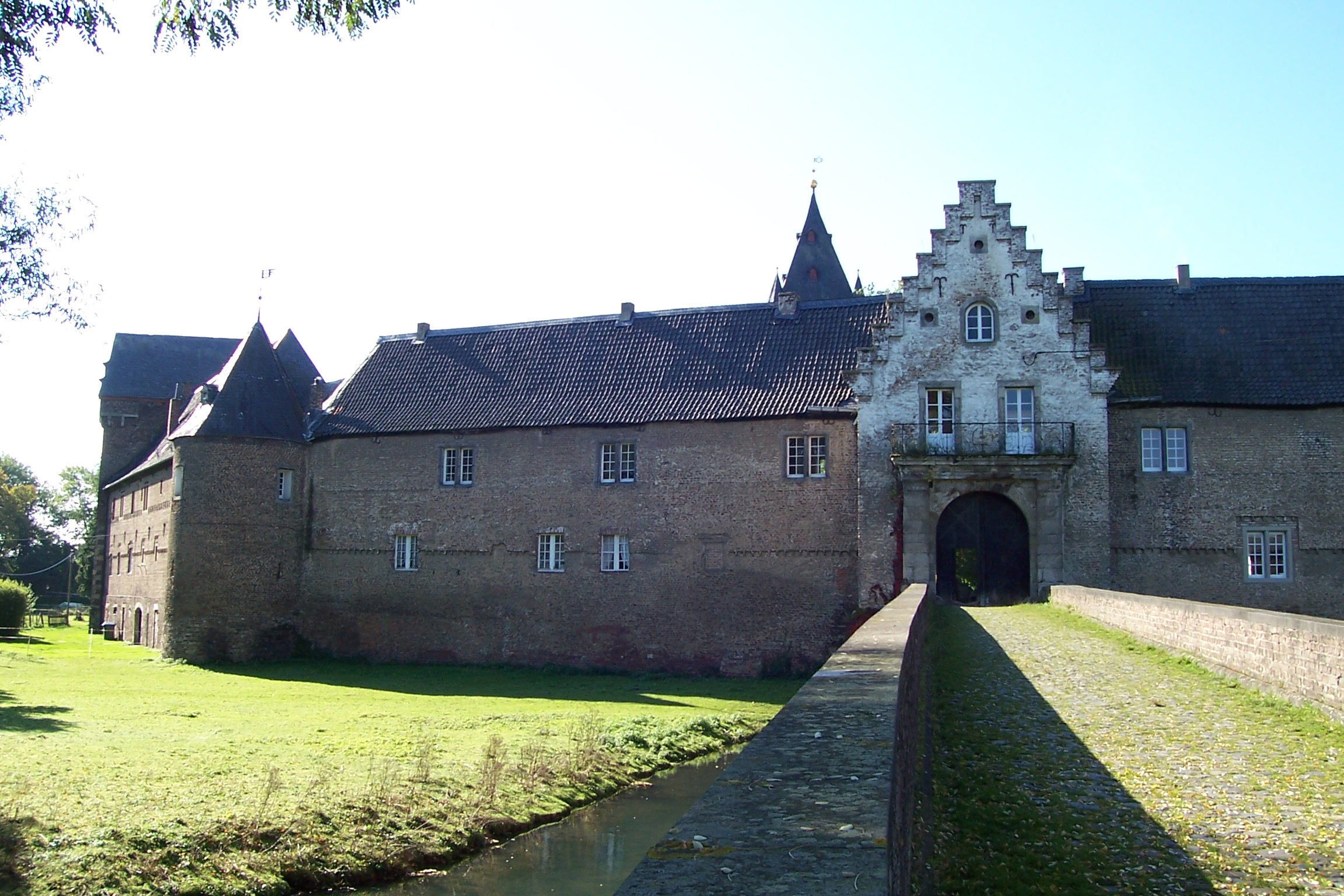 Schloss Hülchrath (Vorburg)